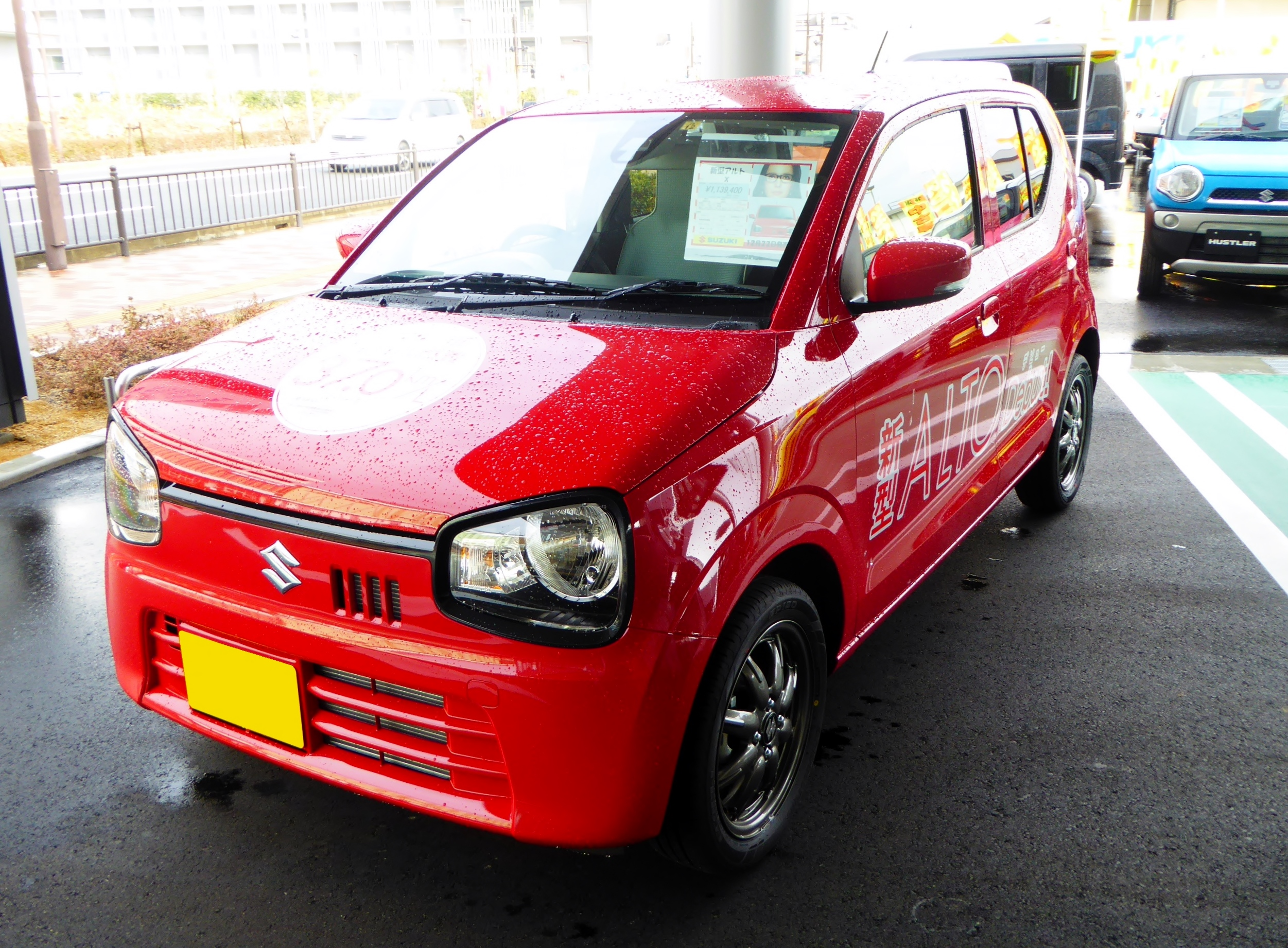 オプションパーツ装着のHA36S型スズキ・アルトXの2トーンバックドア仕様をフロントから撮影。